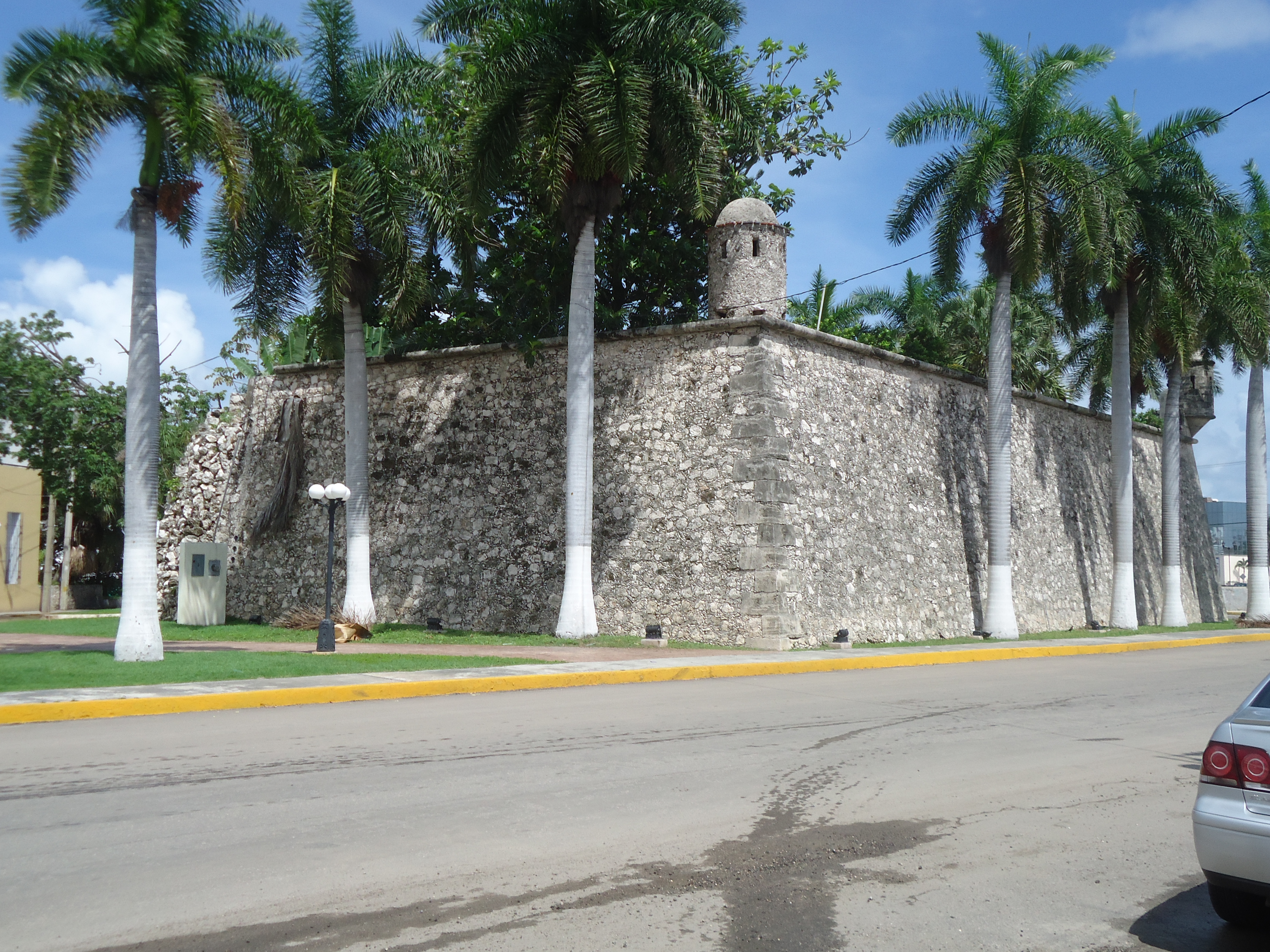 Fotografía del Baluarte de Santiago, San Francisco de Campeche, Campeche